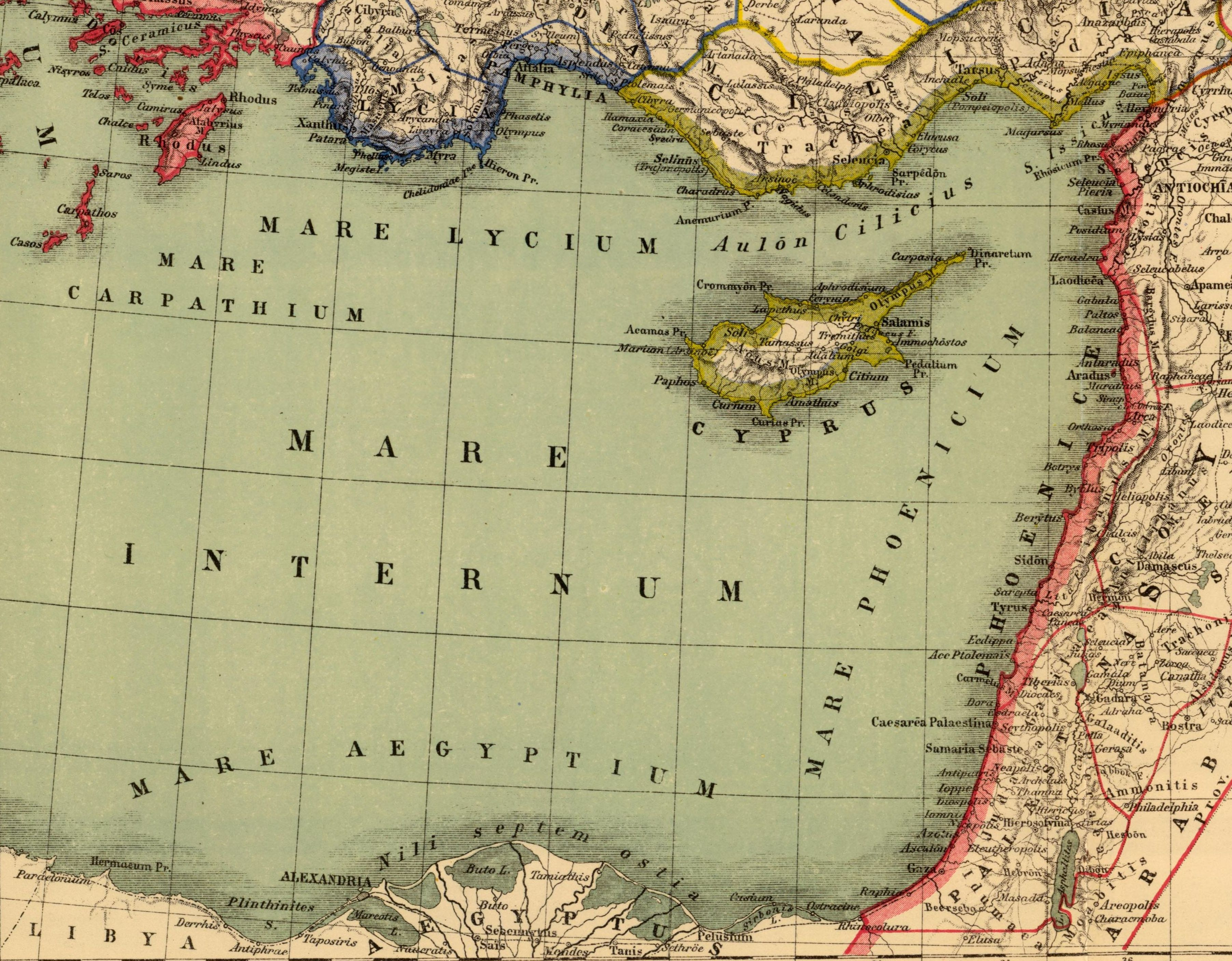 Aegyptus.Mare.Aegyptium.Libya. Asia citerior. Auctore Henrico Kiepert Berolinensi. Geographische Verlagshandlung Dietrich Reimer (Ernst Vohsen) Berlin, Wilhemlstr. 29. (1903)